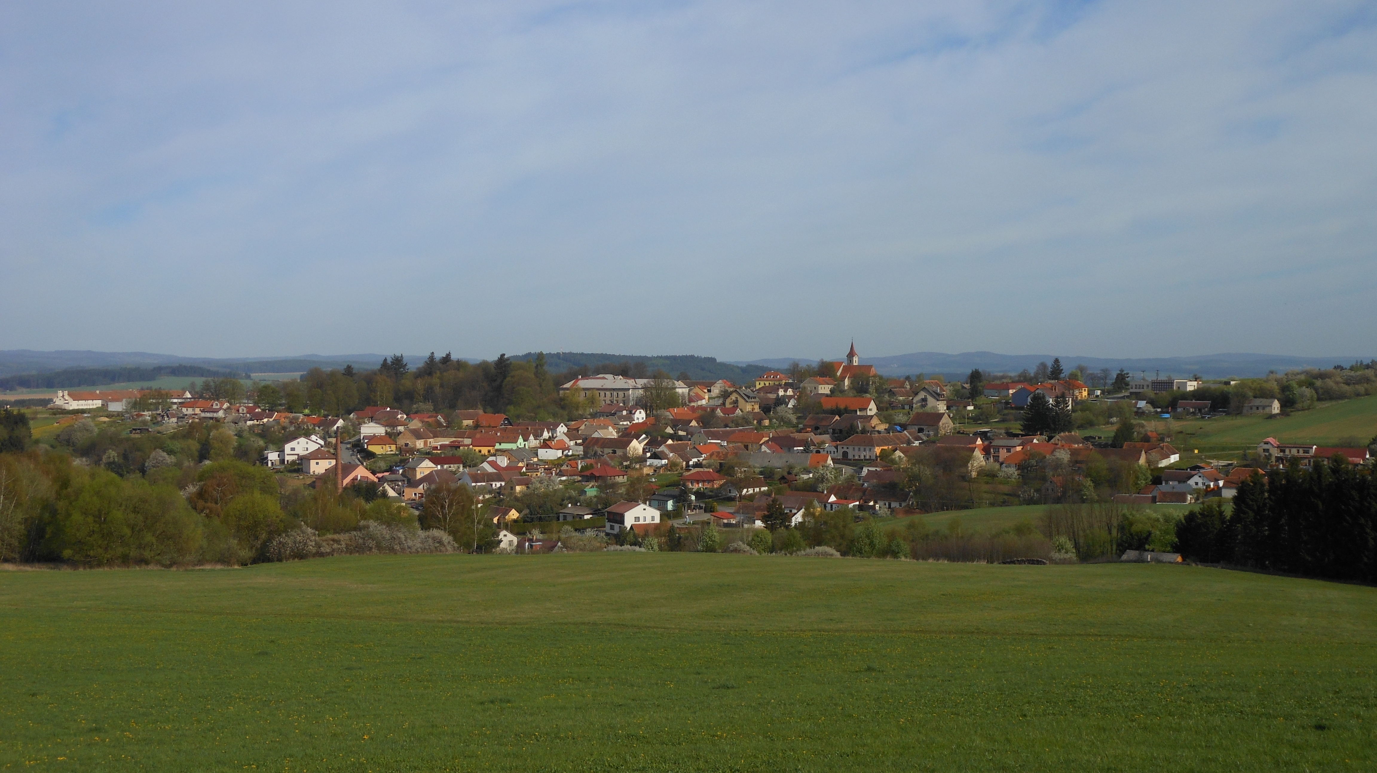 Alt Hart